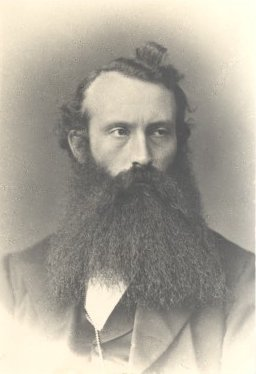 Tartu Ülikooli füüsilise geograafia ja meteoroloogia professor Johann Karl Friedrich Weihrauch (1841–1891).